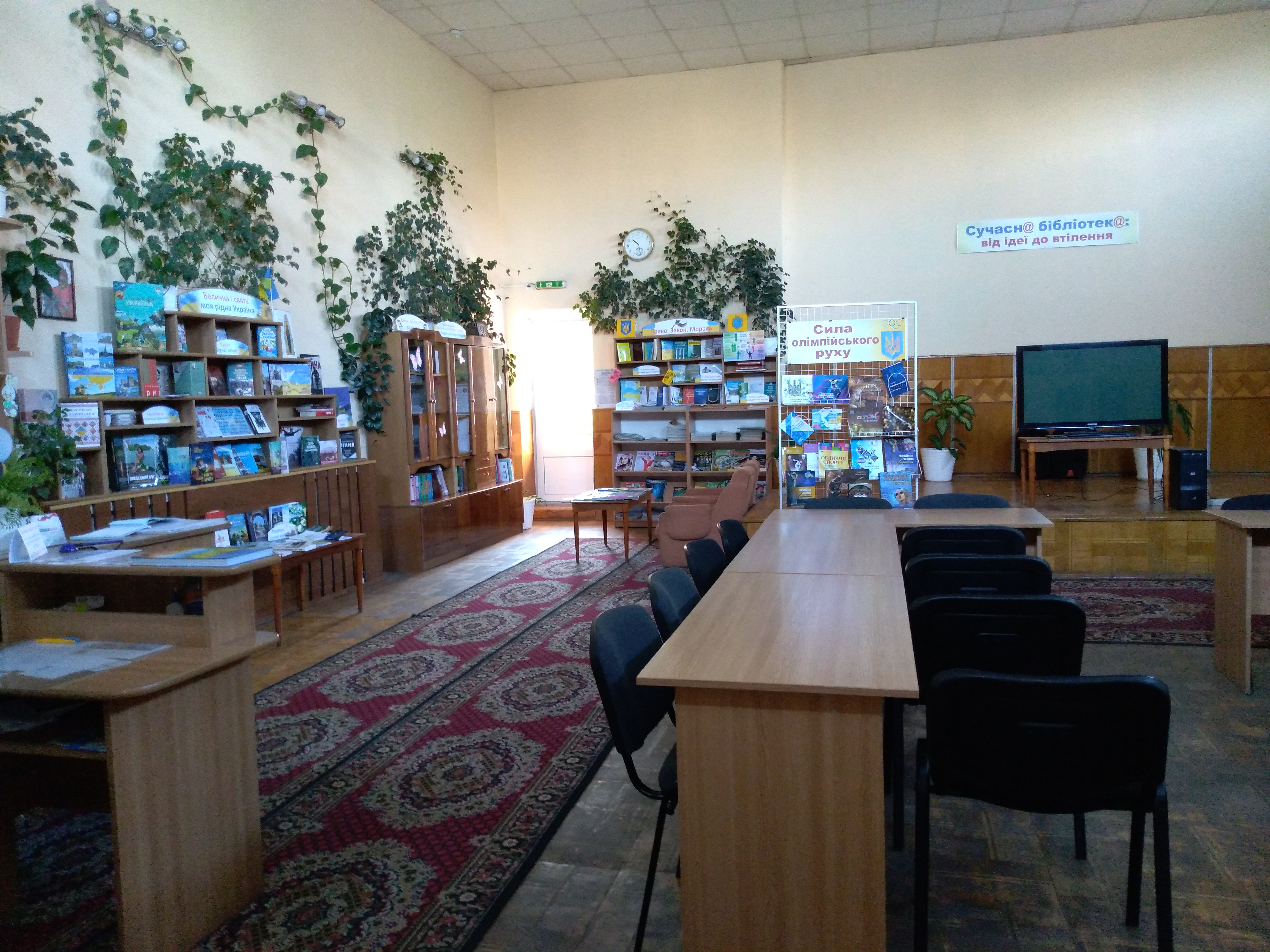 Читальний зал центральної бібліотеки Хмельницької міської ЦБС, червень 2019.